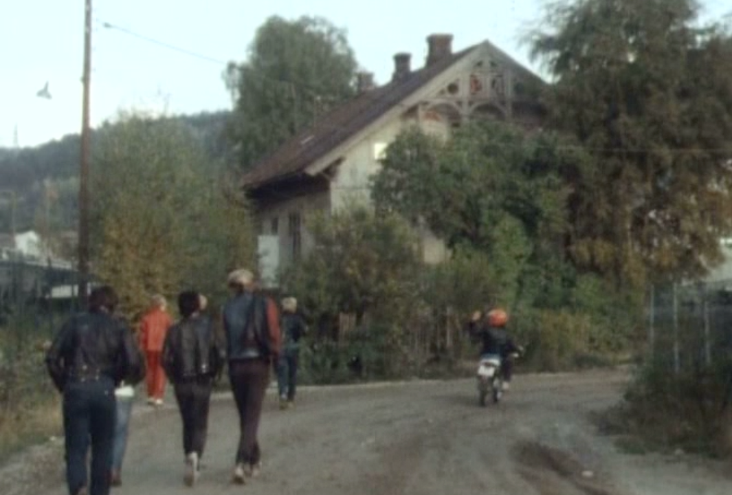 Gamle Rockehuset i Halden